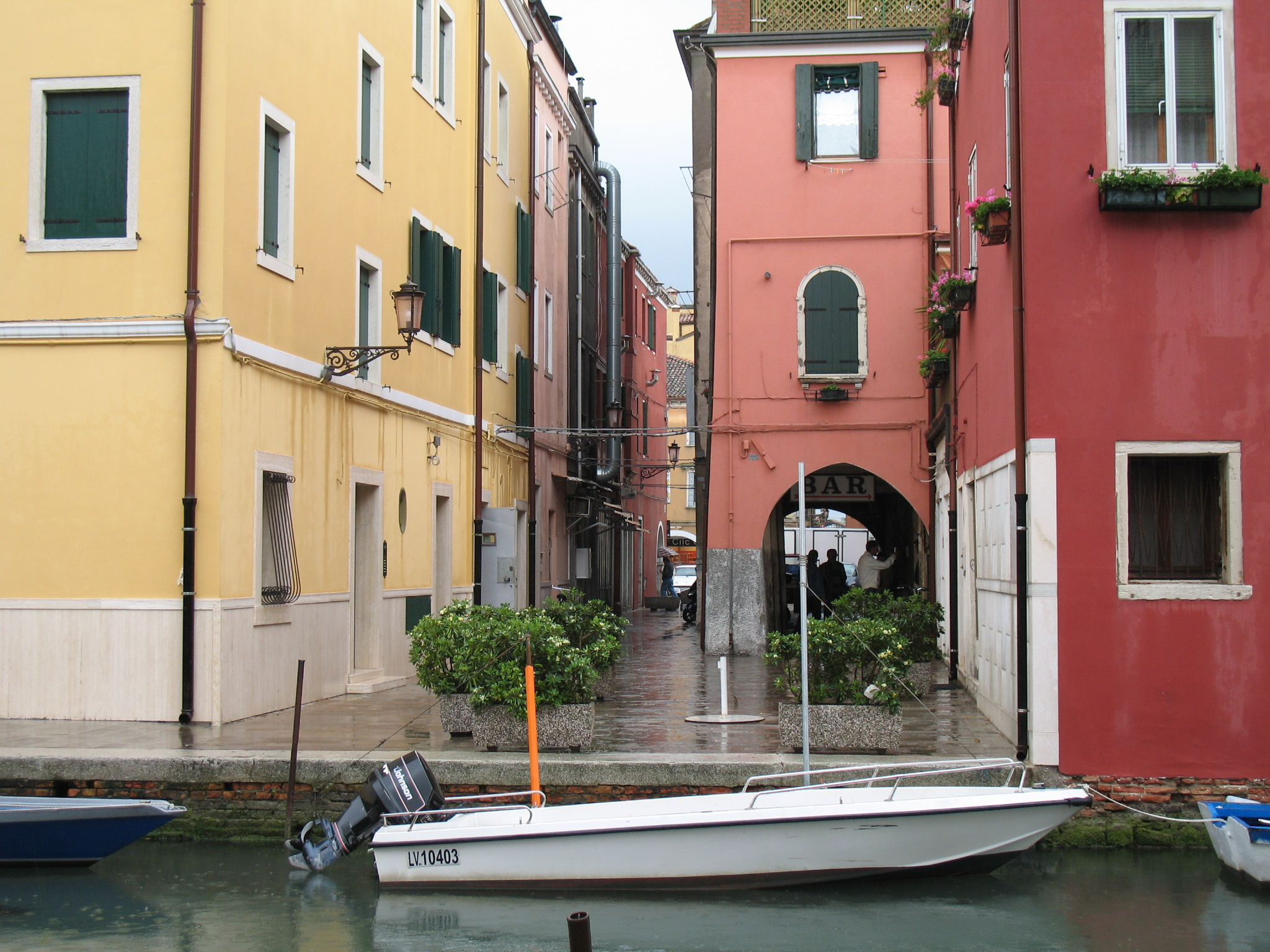 Chioggia, laguna veneta